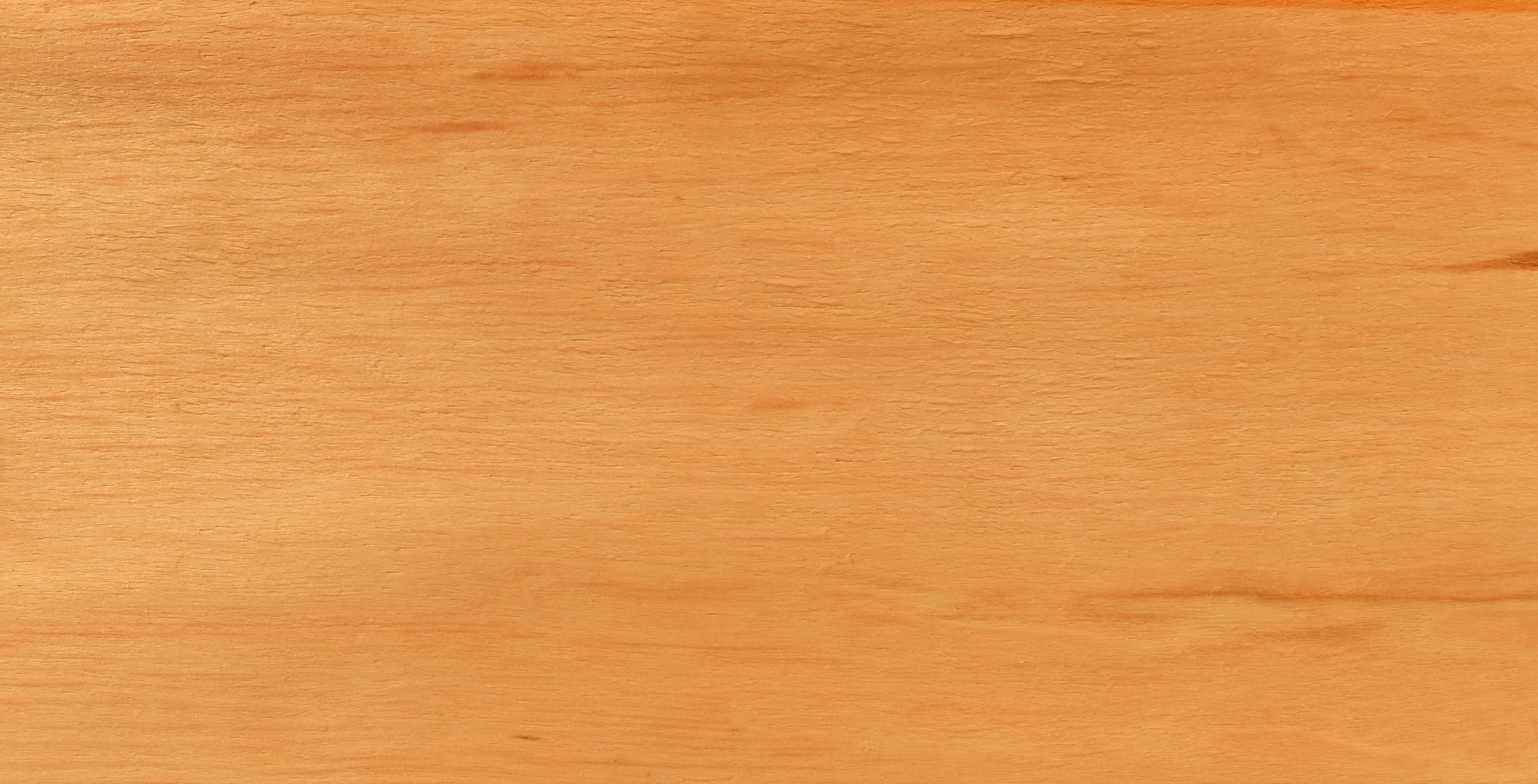 Gemessertes Furnier; Holzart: HB, Hainbuche, Weißbuche